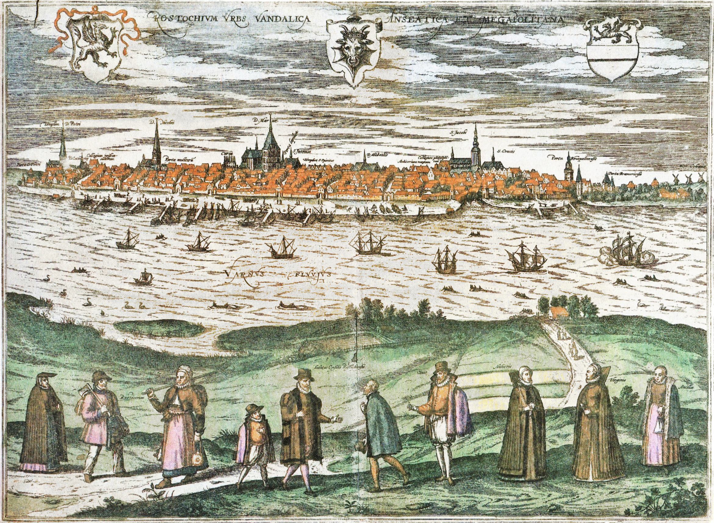 Panorama Rostocks von Norden (Gehlsdorfer Ufer), kolorierter Kupferstich